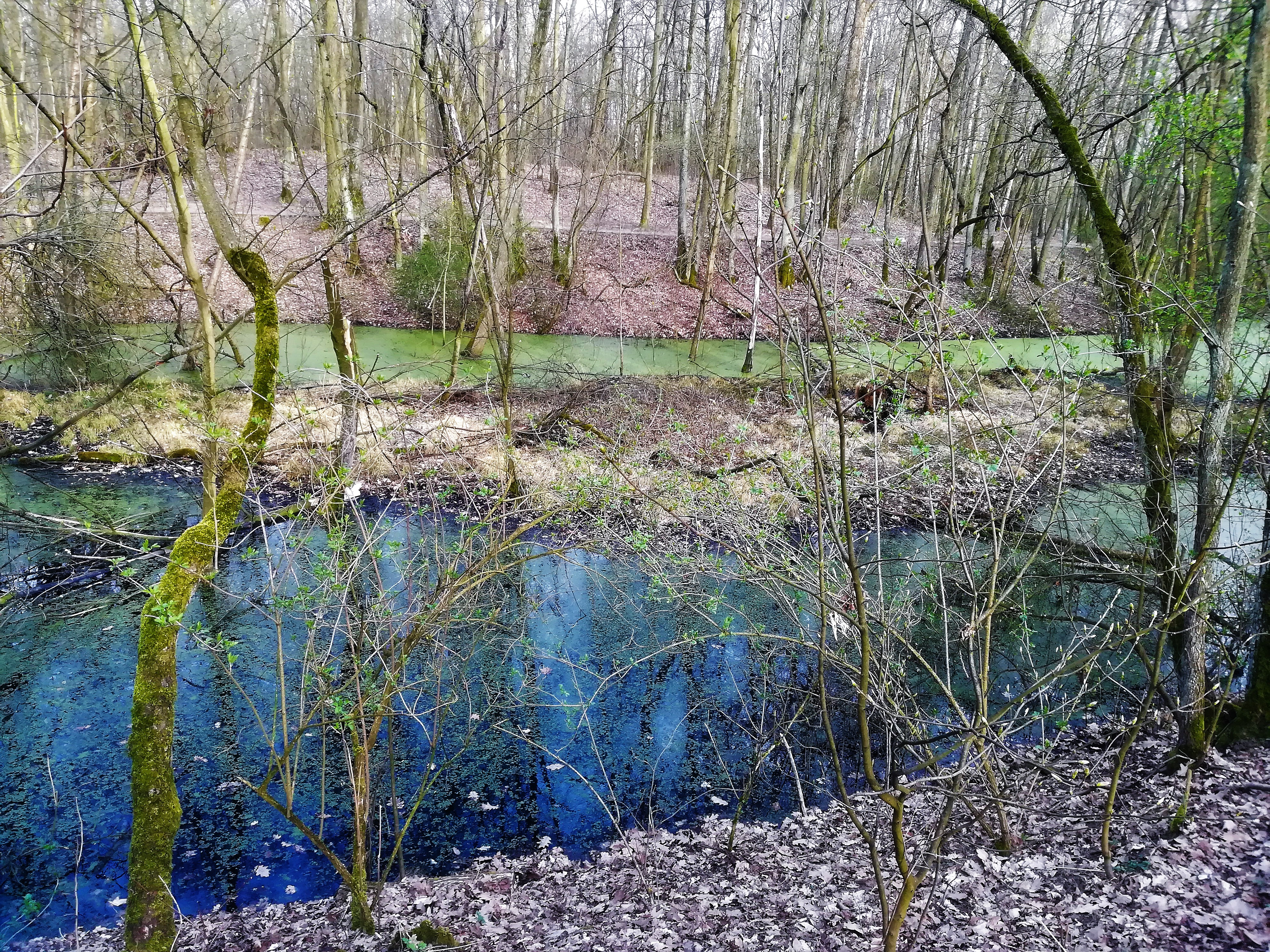 Rezerwat Żurawiniec w Poznaniu w 2018, po podniesieniu poziomu wód.